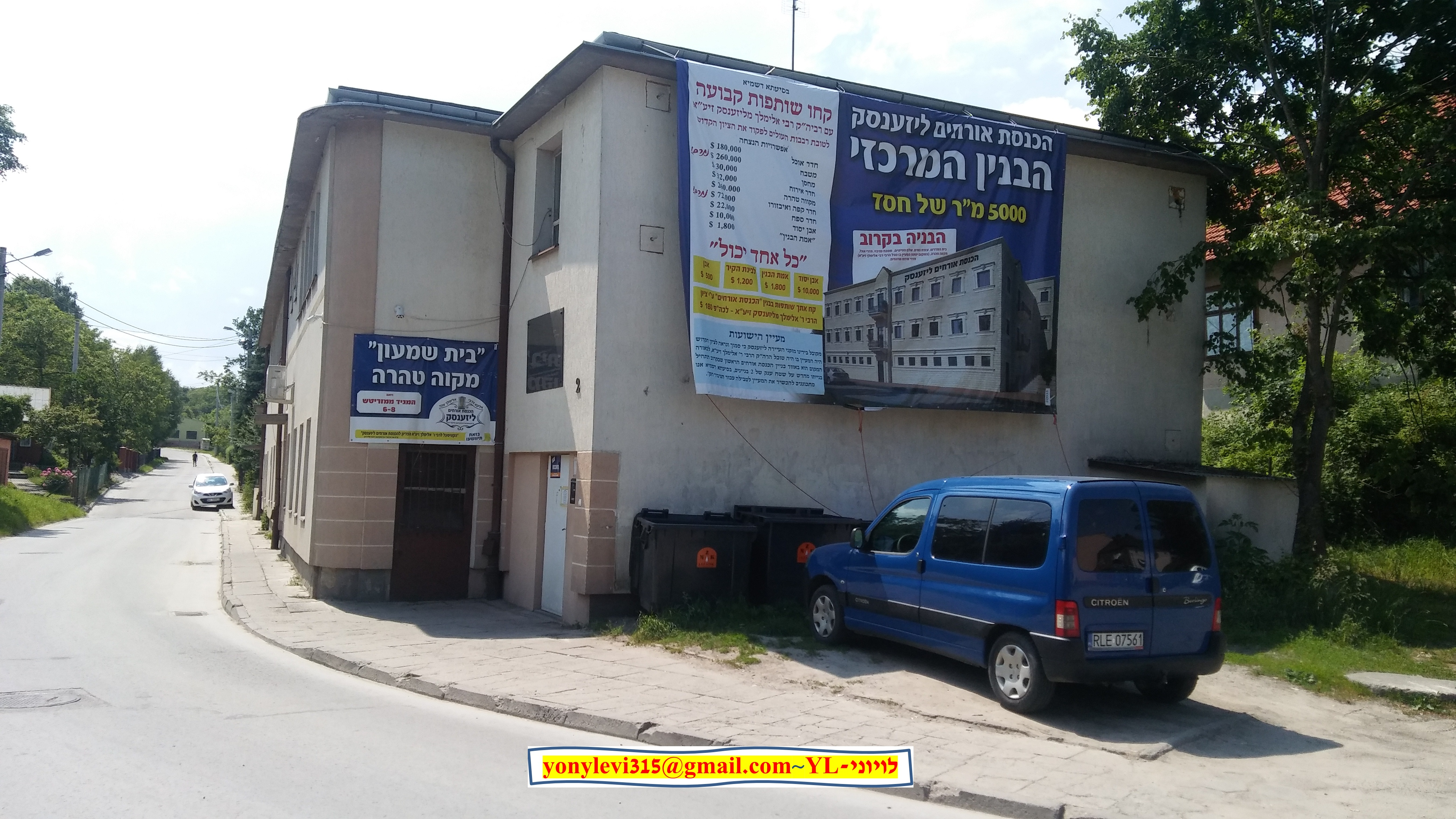 בית הכנסת האורחים בליז'נסק, סמוך לקבר ה"נועם אלימלך". התשע"ז/2017